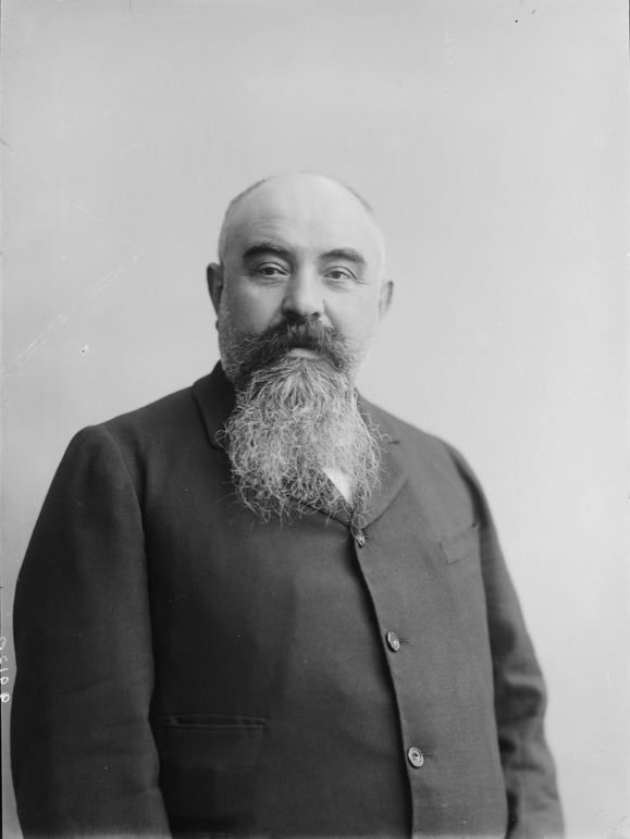 Giuseppe Giacosa fotografato da Mario Nunes Vais